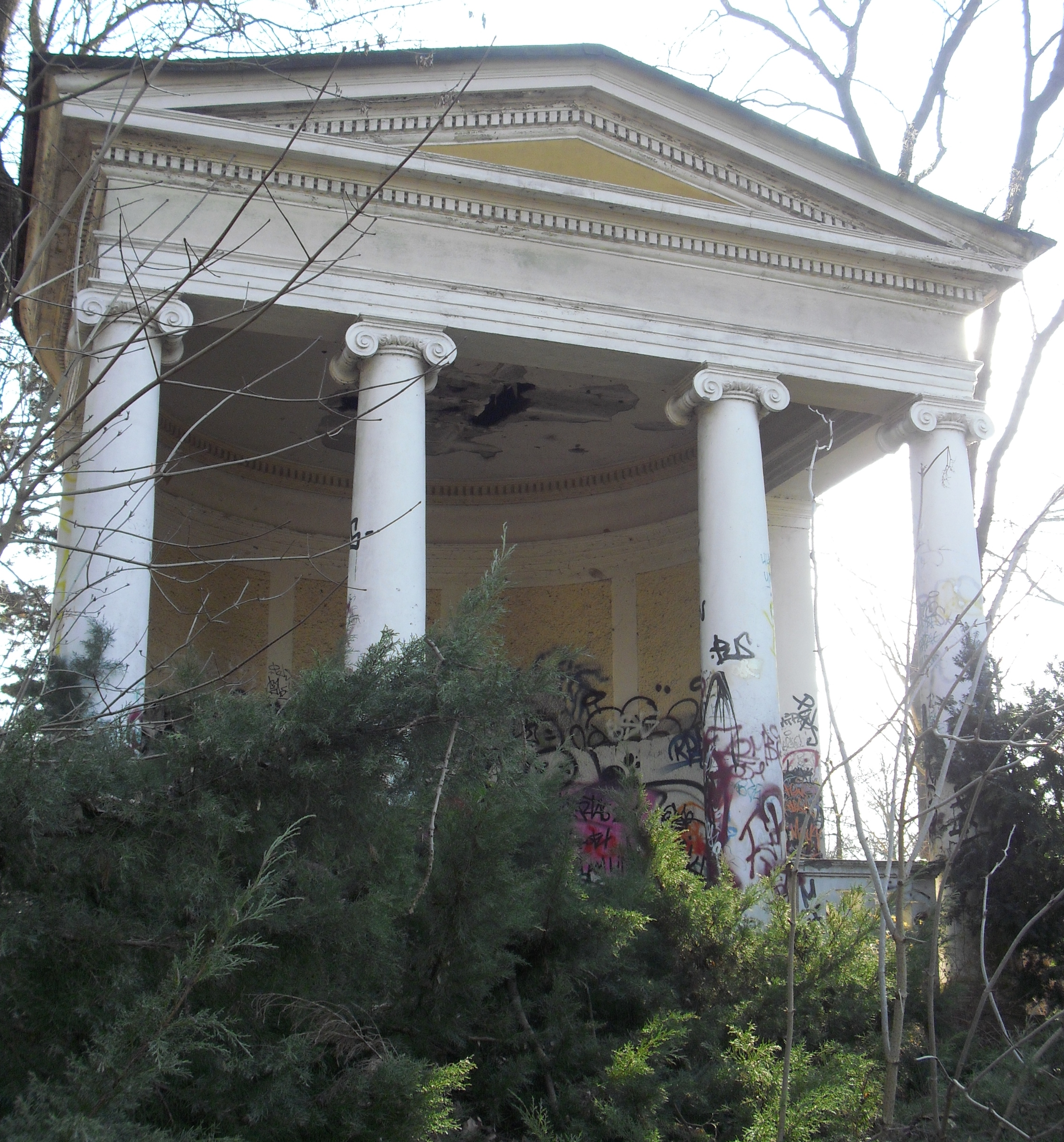 Prostylos römisch-ionischer Ordnung